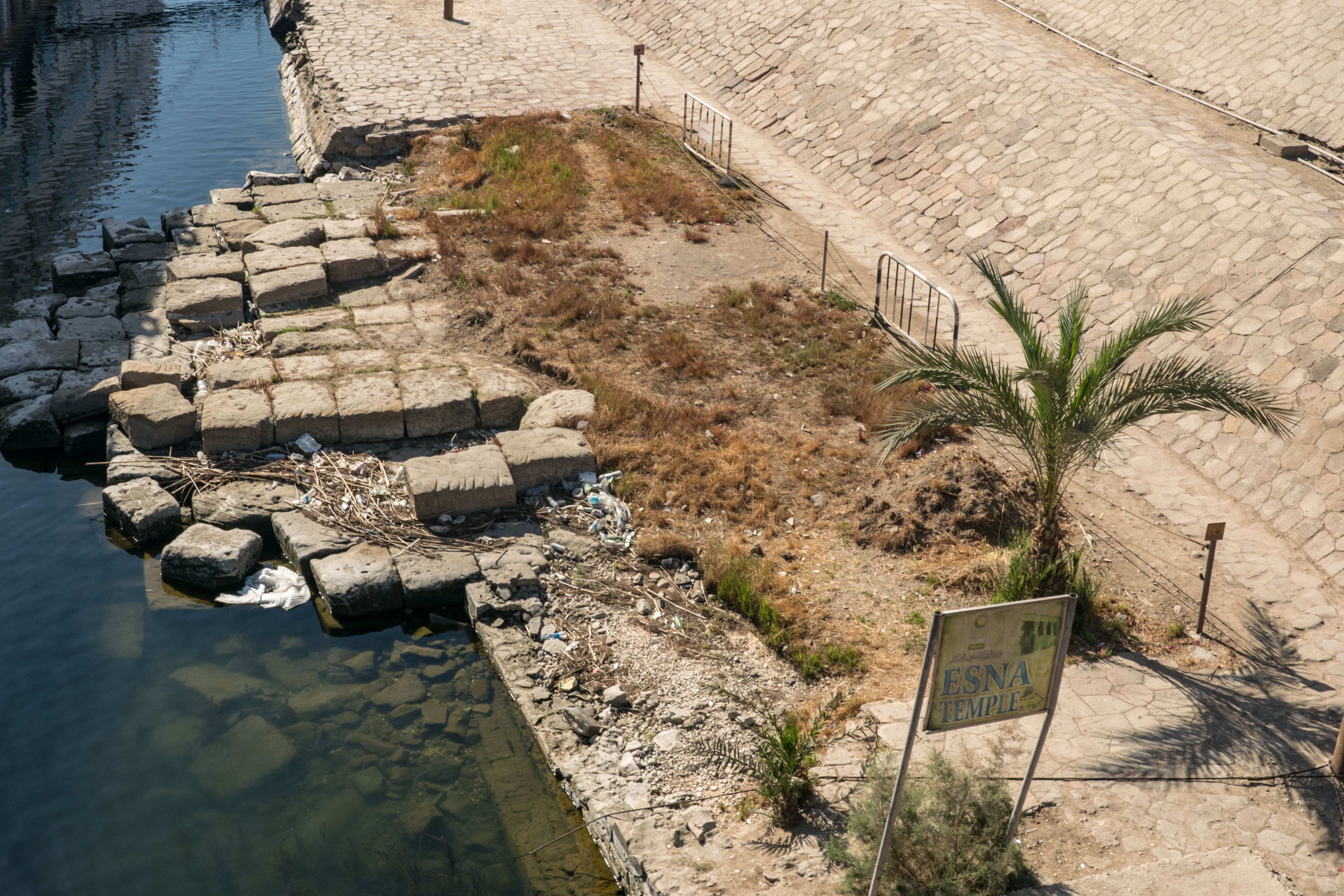 Restfragmente vom antiken Uferkai der Nilortschaft Esna